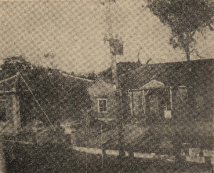 新竹州苗栗郡苑裡庄役場